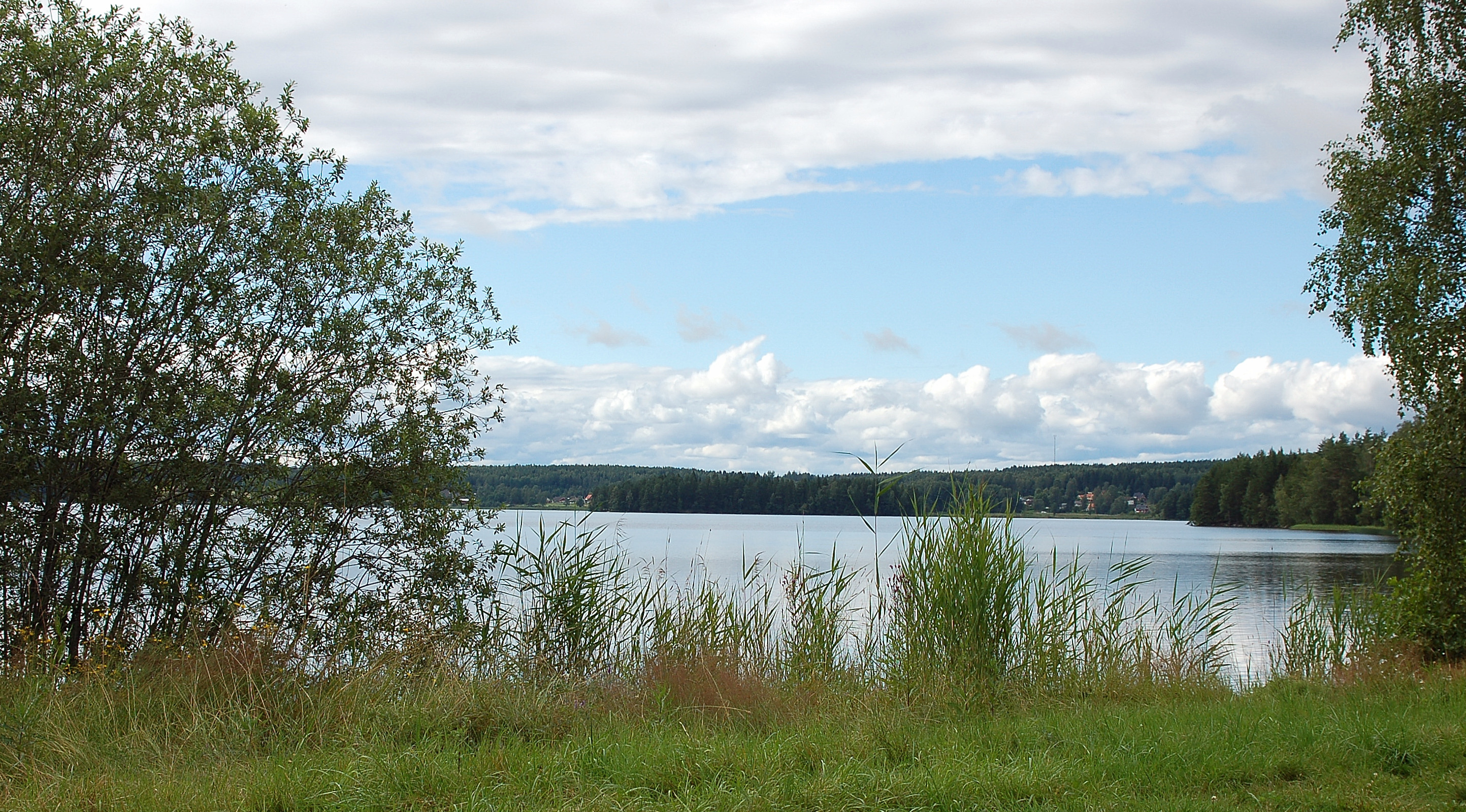 Molkomssjöns östra sida mot norr.